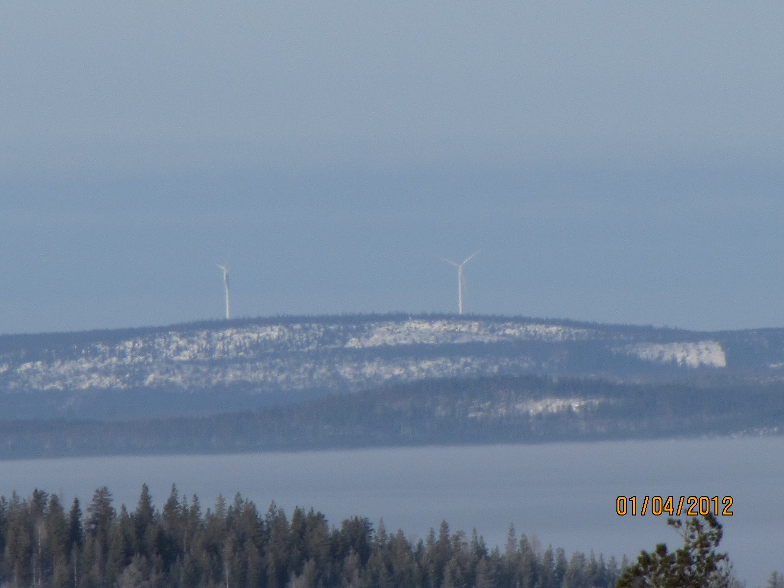 Aapua Windmills,nähtynä Orajärveltä